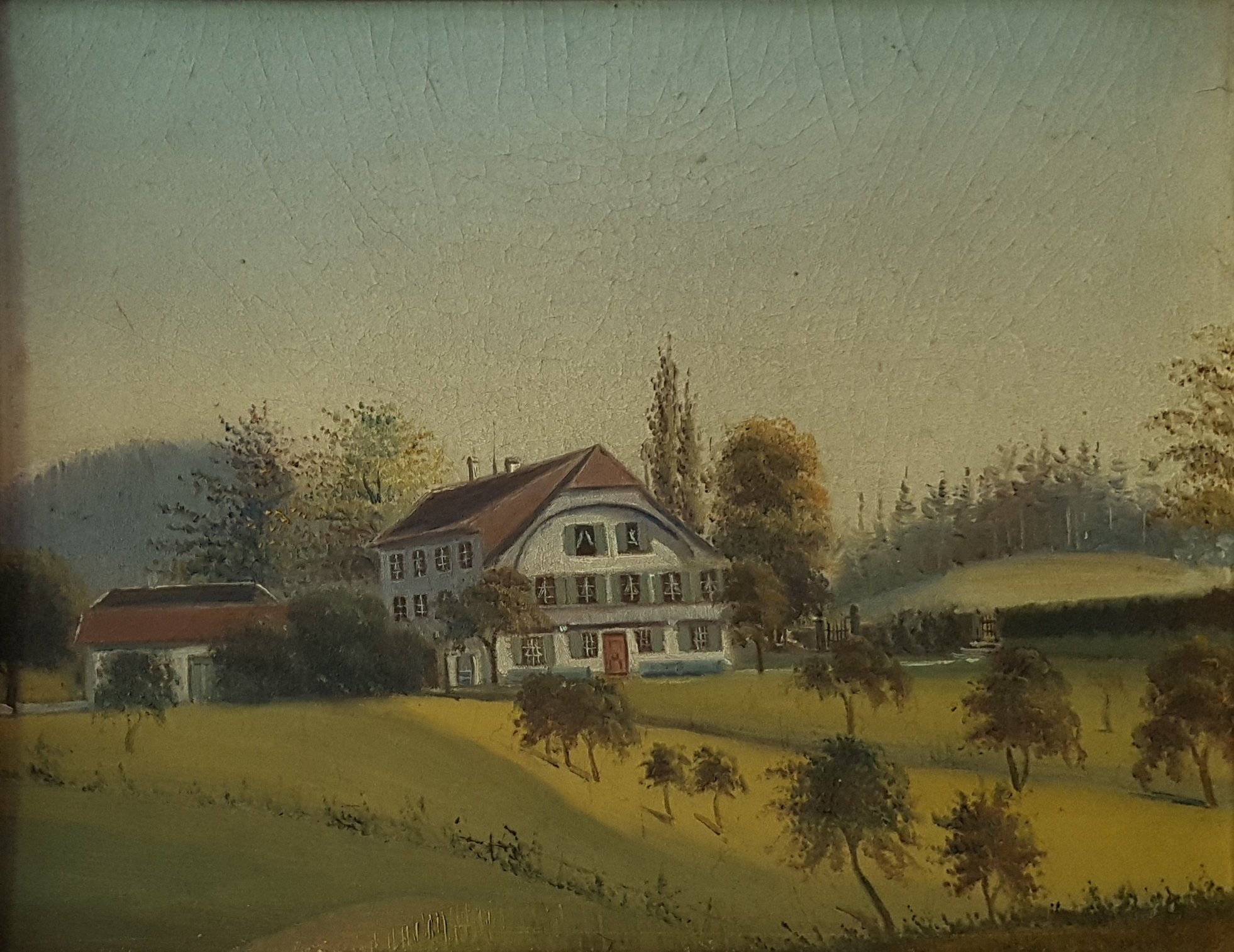 Stiftung Schloss Jegenstorf, Campagne Hölziger Ofen